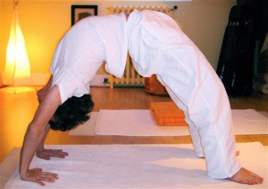 Yoga postures Urdva_Dhanurasana